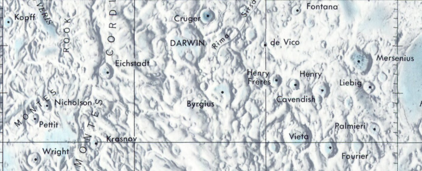 Cráter lunar Byrgius. Localización. (Lunar Chart LPC1. Second Edition)